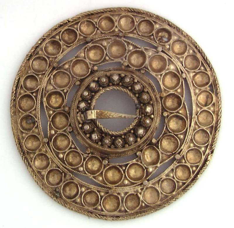 Skålsølje i forgylt sølv med påsatt filigran, innkjøpt i 1896 i Bygland i Aust-Agder. Foto Anne-Lise Reinsfelt / Norsk Folkemuseum, NF.1896-1914.